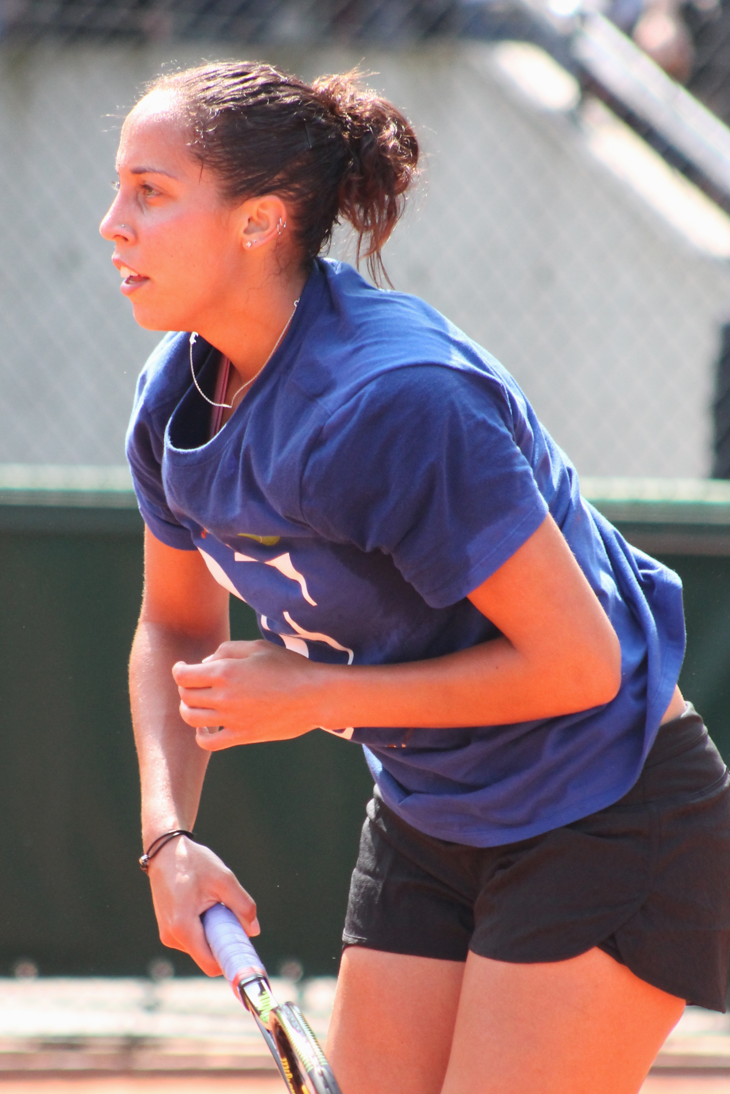 Keys RG16 (3)